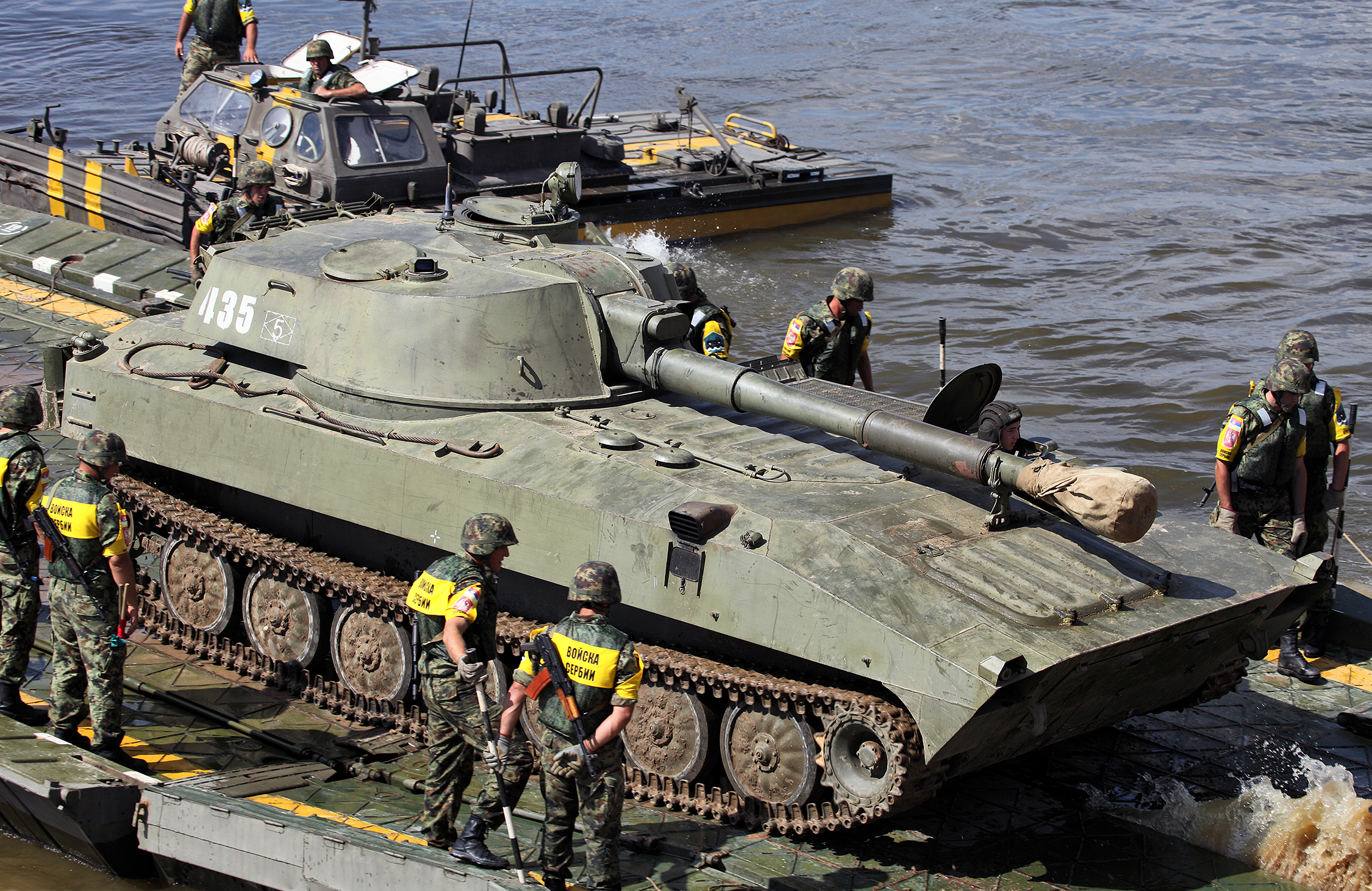 САУ 2С1 Гвоздика (2S1 Gvozdika self-propelled howitzer)